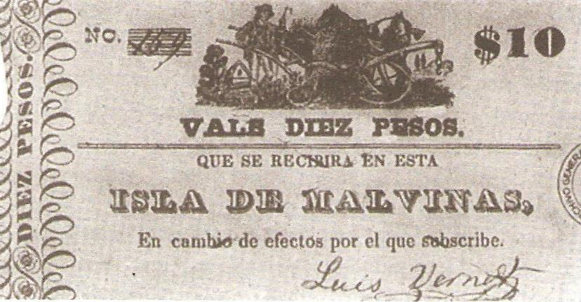 10 Pesos – Geldschein emittiert von Luis Vernet auf den Falklandinseln, vermutlich von 1829.